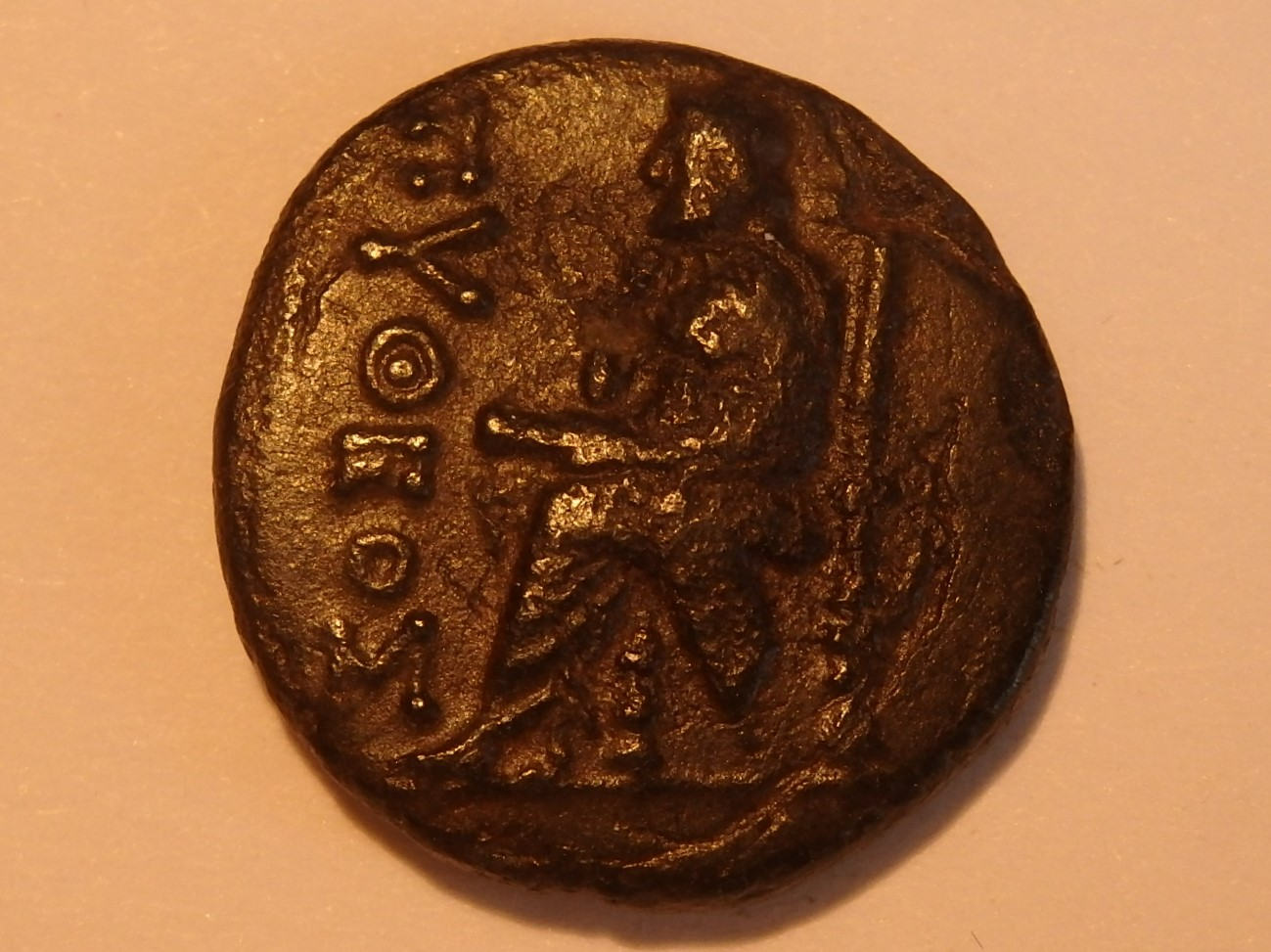 sitzender Homer auf Münze aus Kolophon, 50-30 v. Chr., SNG v. Aul 2017